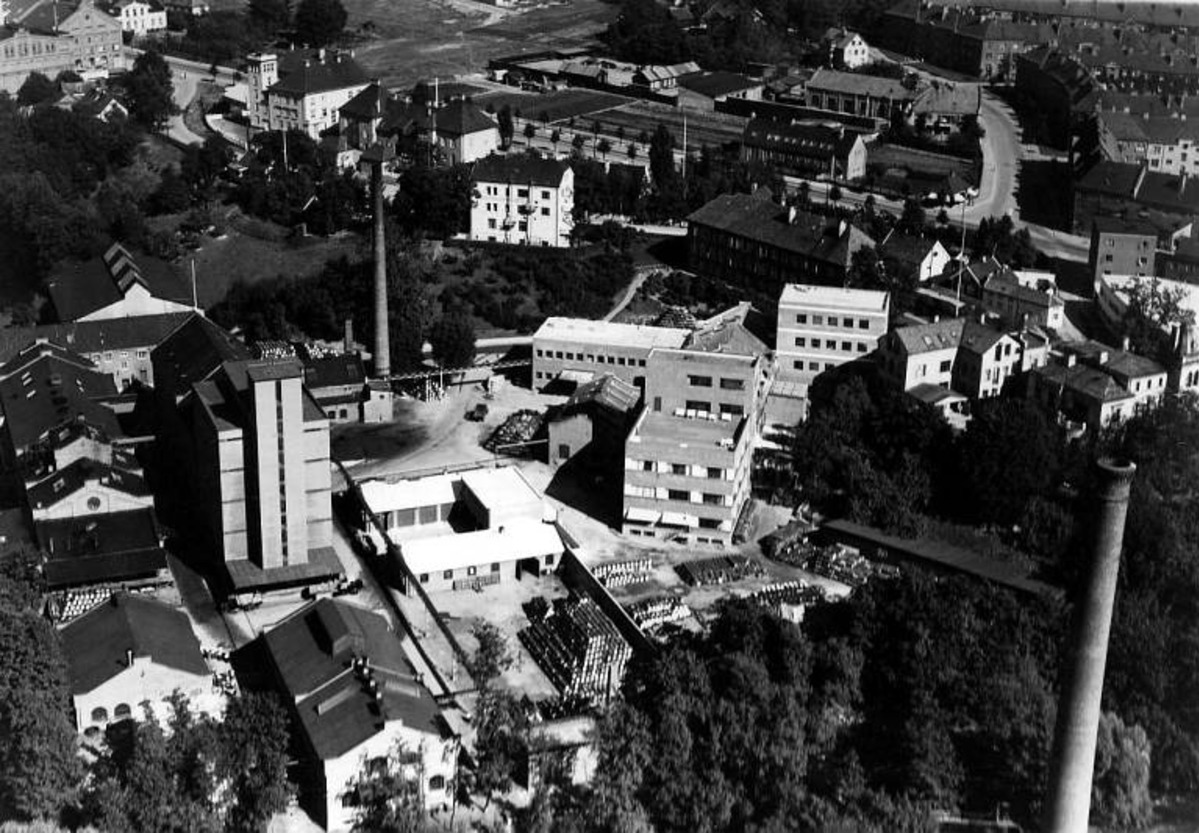 Lilleborg fabrikker, fotografert ca. 1936. Sandakerveien og Åsengata i bakgrunnen.